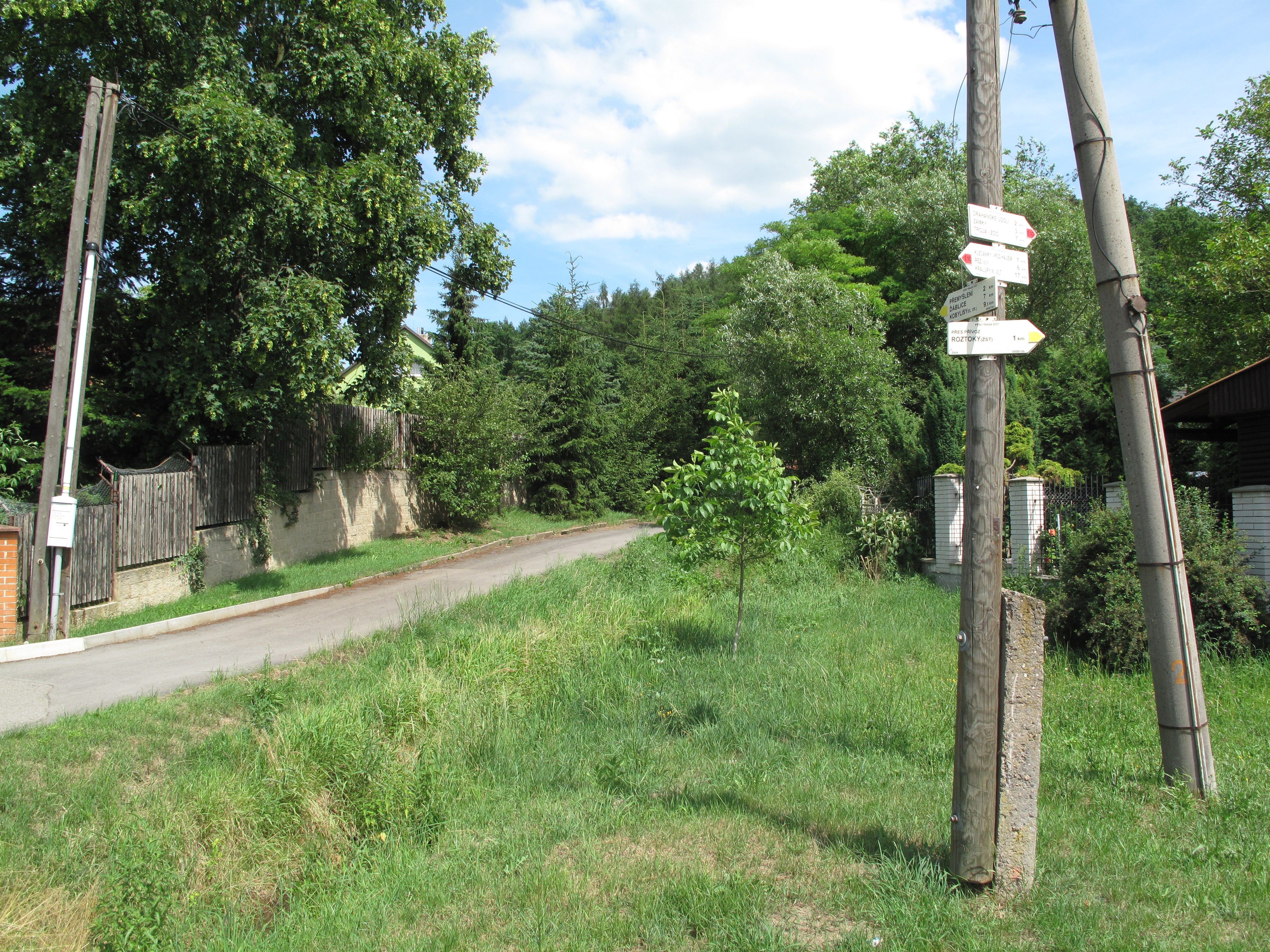 Rozcestí u Klecan